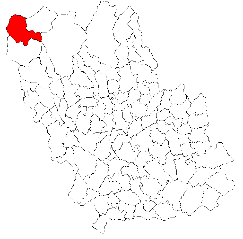 Categorie:Hărţi ale judeţului Prahova